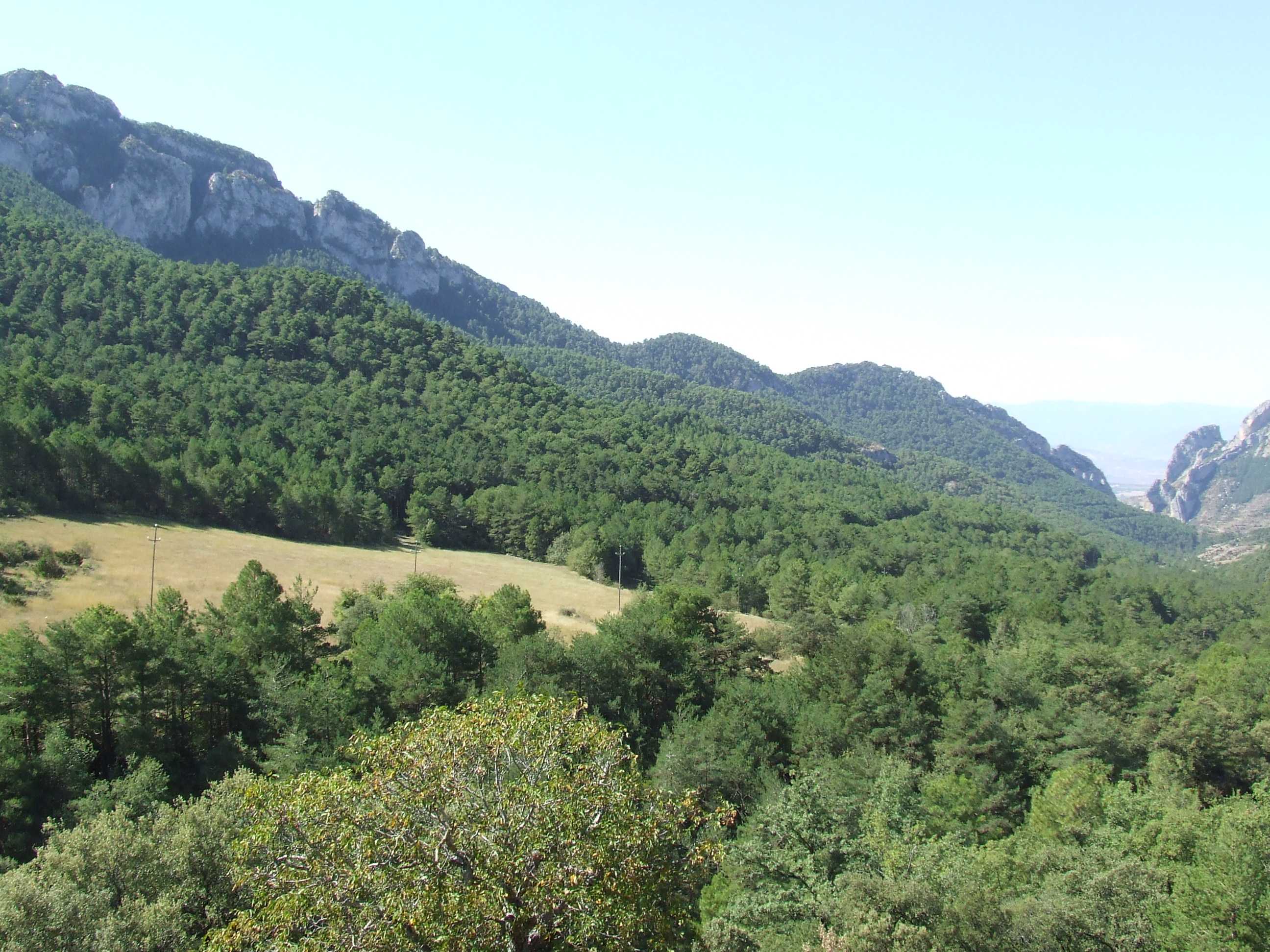 El Bosc d'Abella (Abella de la Conca, Pallars Jussà)